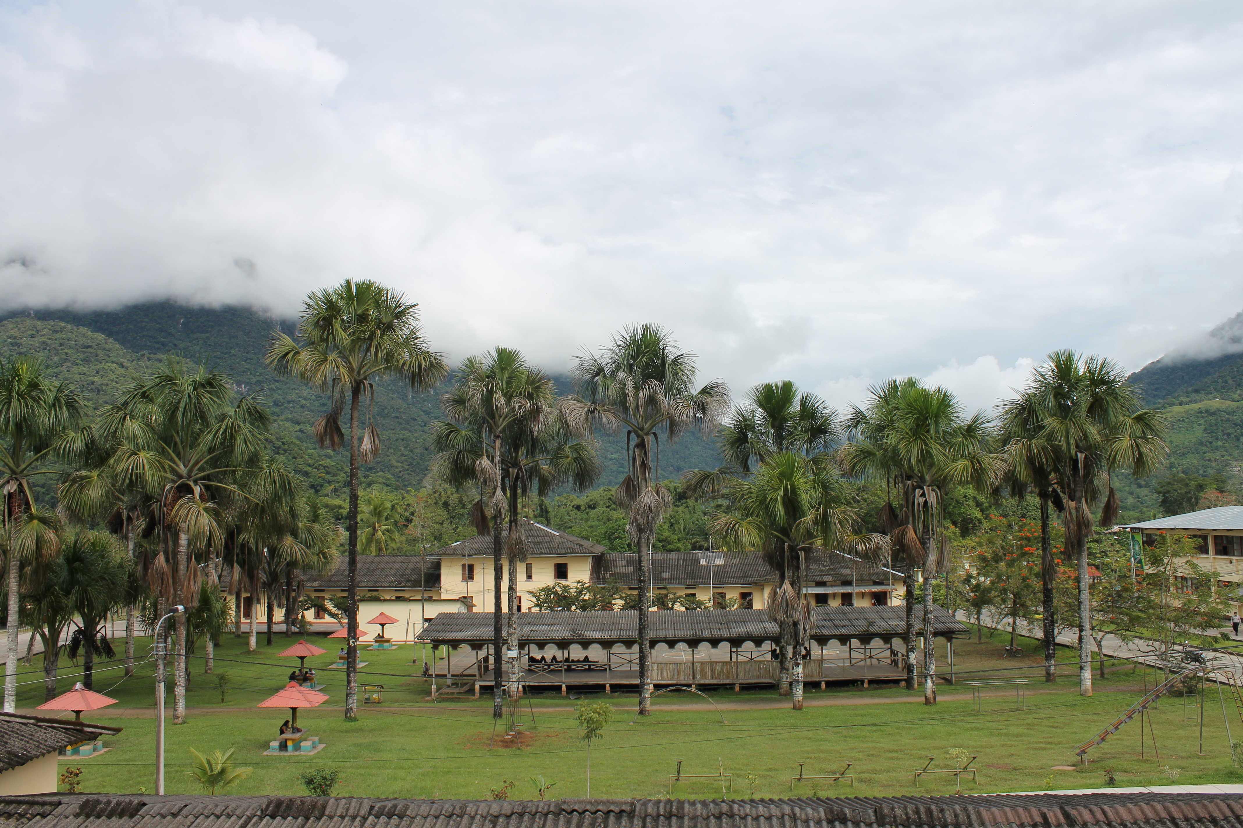 Zona de esparcimiento y presentación para eventos cívicos y culturales